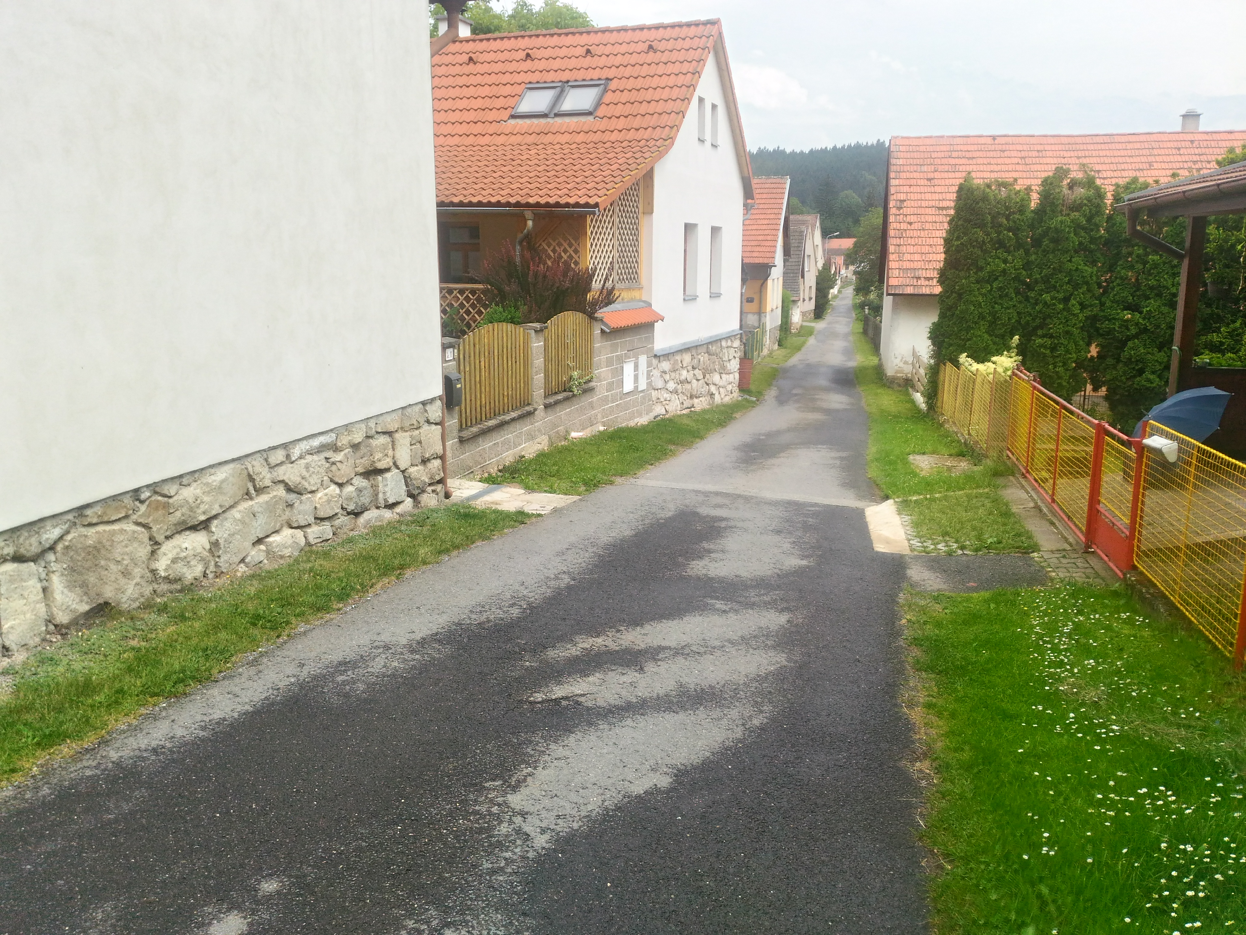 Podol, okres Tábor, Česká republika